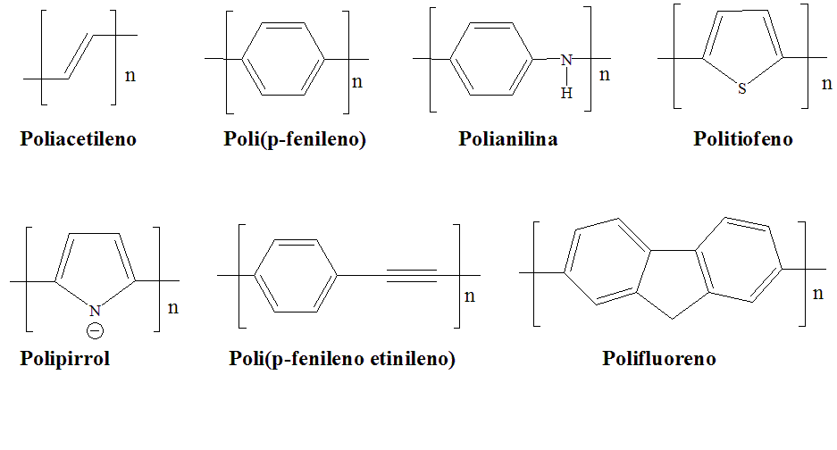 Ejemplos de polímeros semiconductores